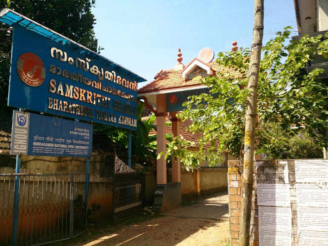 ഭാരതീയ വിചാര കേന്ദ്രം